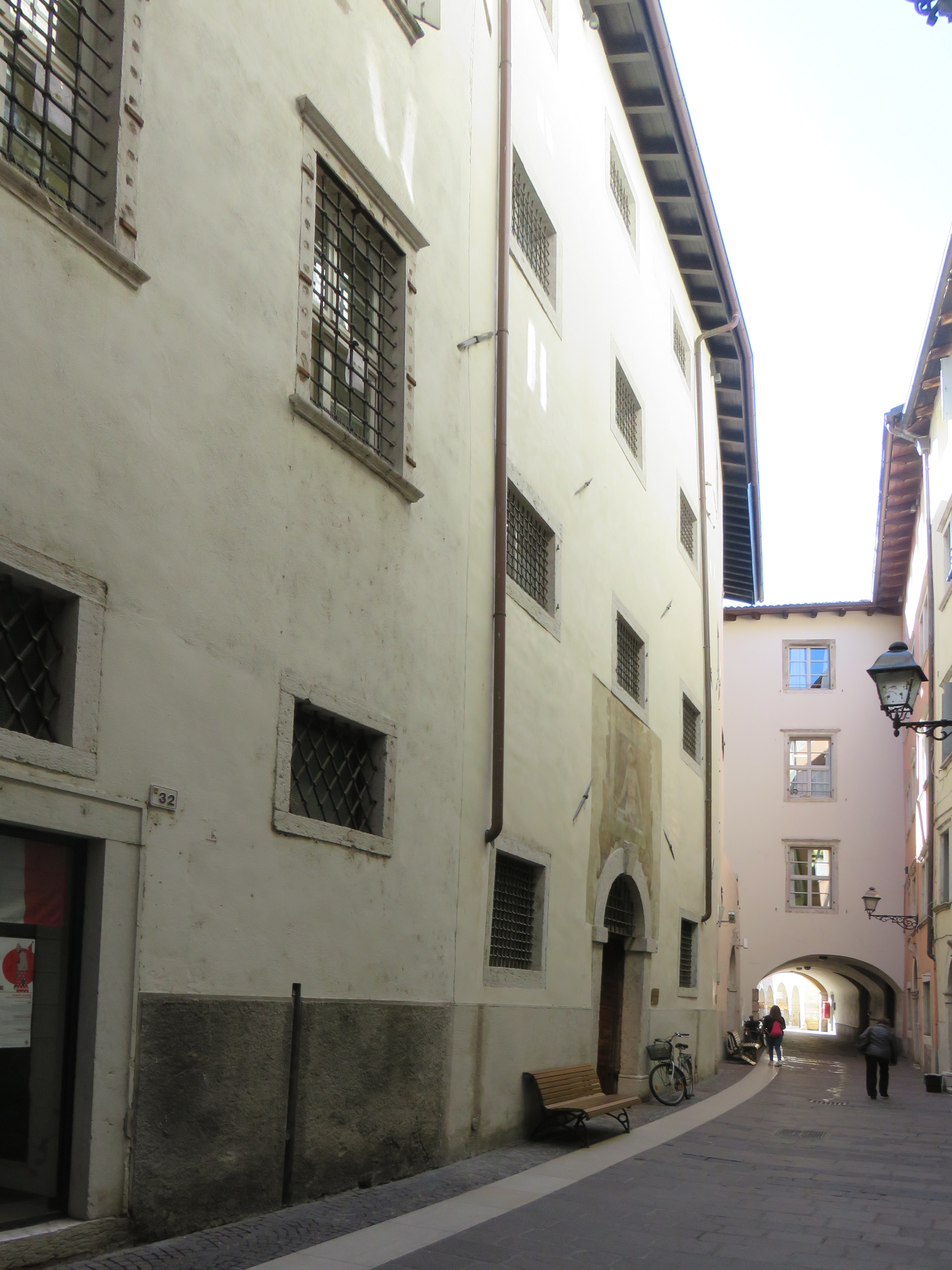 Casa in via Portici 34